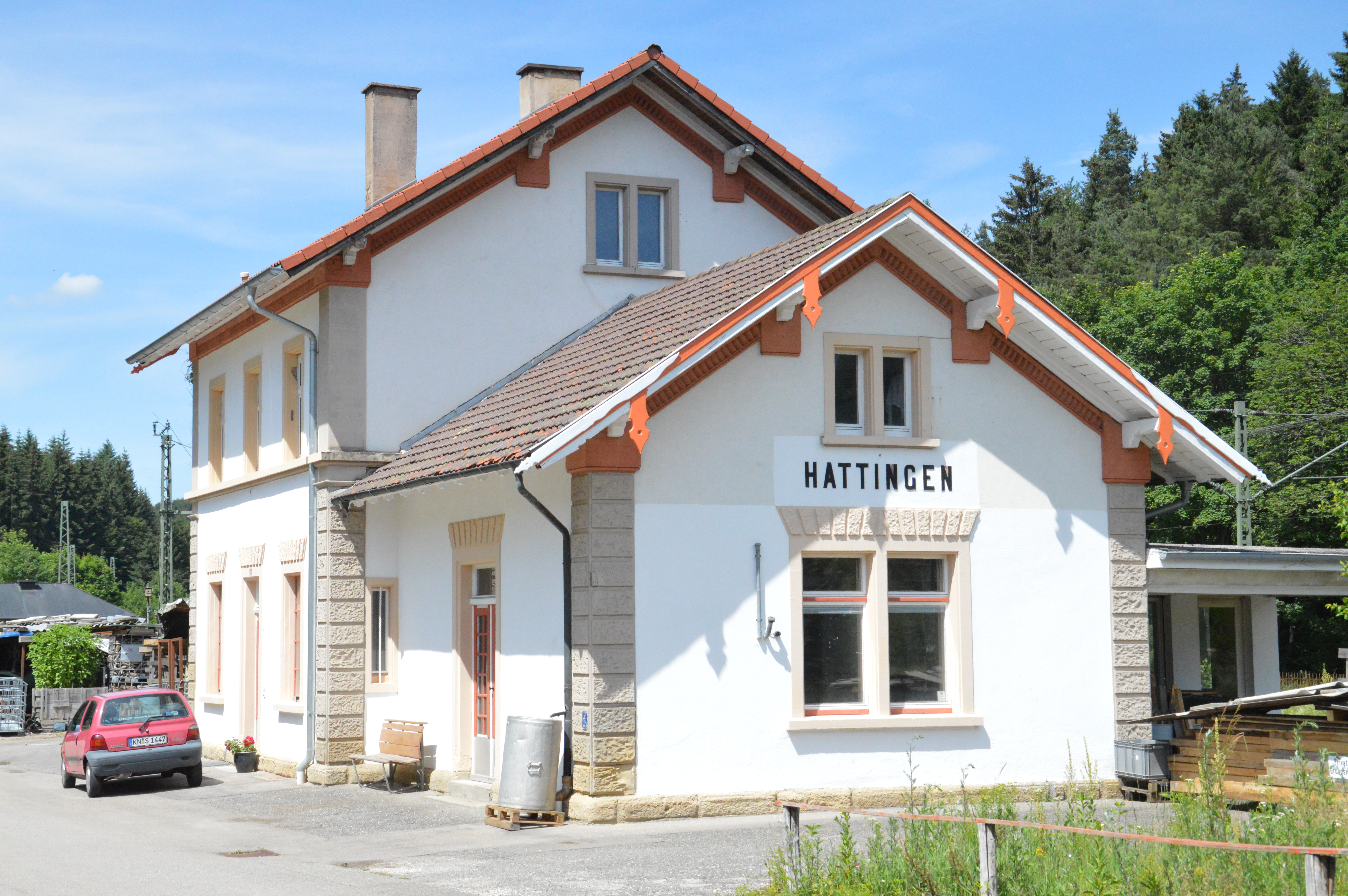 EG vum baddischè Bedrybsbaahnhof Hattingè, im südlichè Èndpungt vo dè Gäubaan.